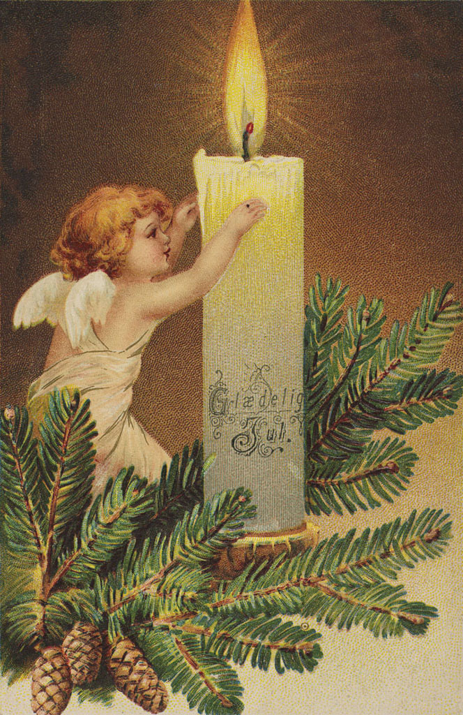 Tittel / Title: Glædelig Jul, ca 1906 Motiv / Motif: Postkort / julekort. Dato / Date: ca 1906 Kunsnter / Artist: ukjent / unknown Utgiver / Publisher: ukjent / unknown Eier / Owner Institution: Nasjonalbiblioteket / National Library of Norway Lenke / Link: Bildesignatur / Image Number: blds_01761